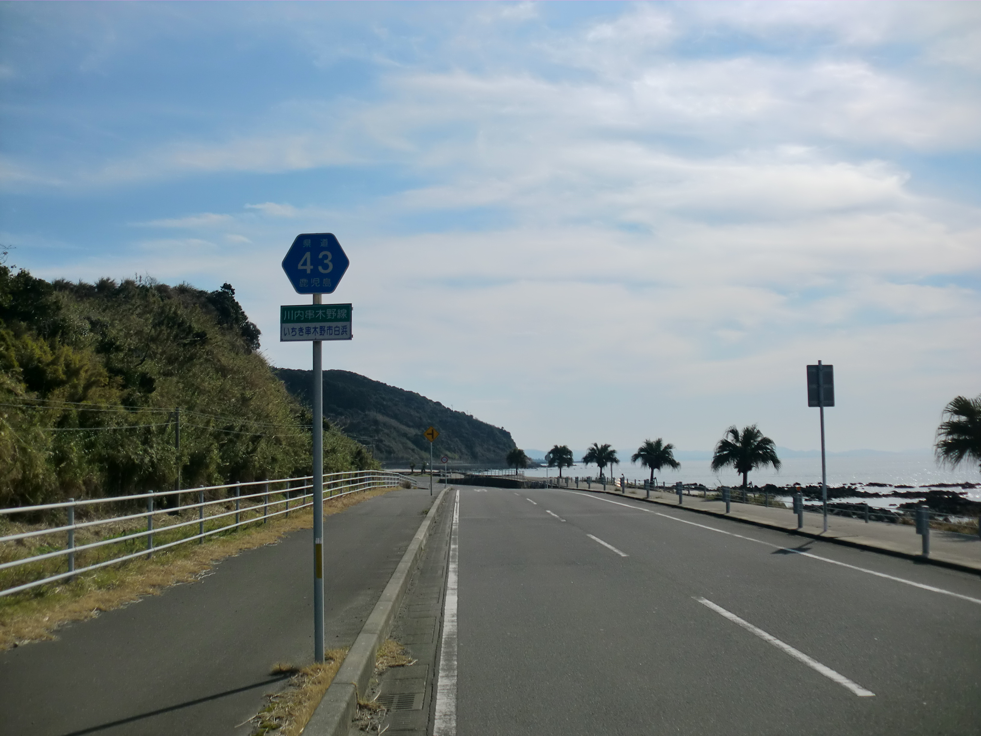 鹿児島県道43号線川内串木野線。いちき串木野市で撮影。